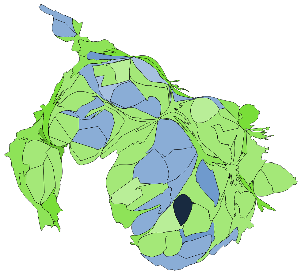 中文（台灣）: 顏色對照表